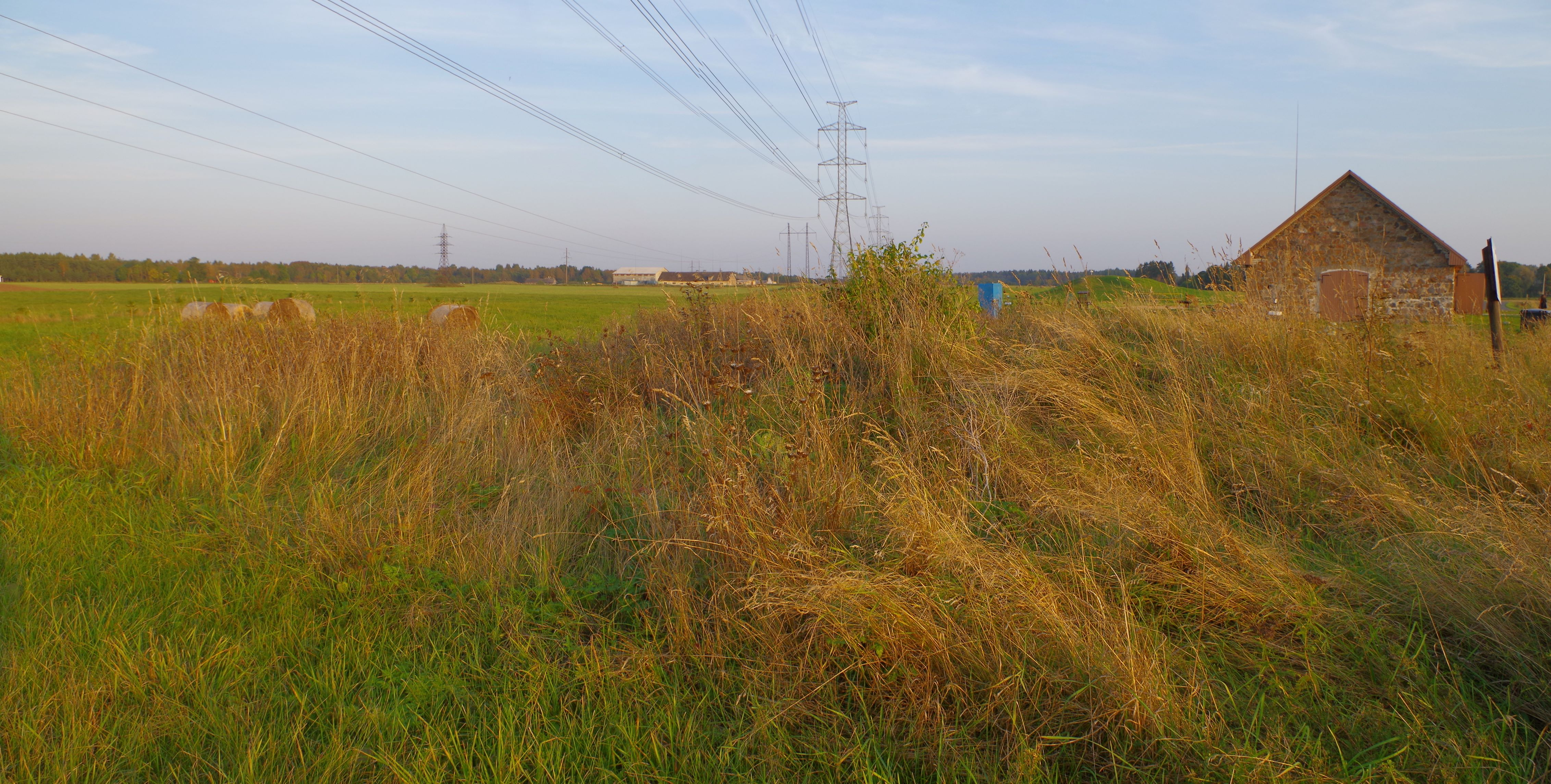 Kivikalme "Vareteväli"